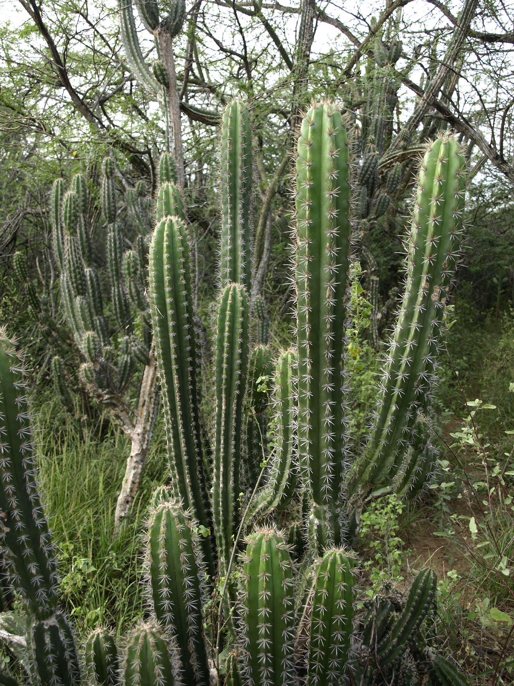 Monte Cristi, Dominican Republic.